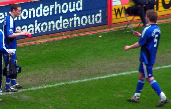 Thomas Vermaelen & Jan Vertonghen at Ajax